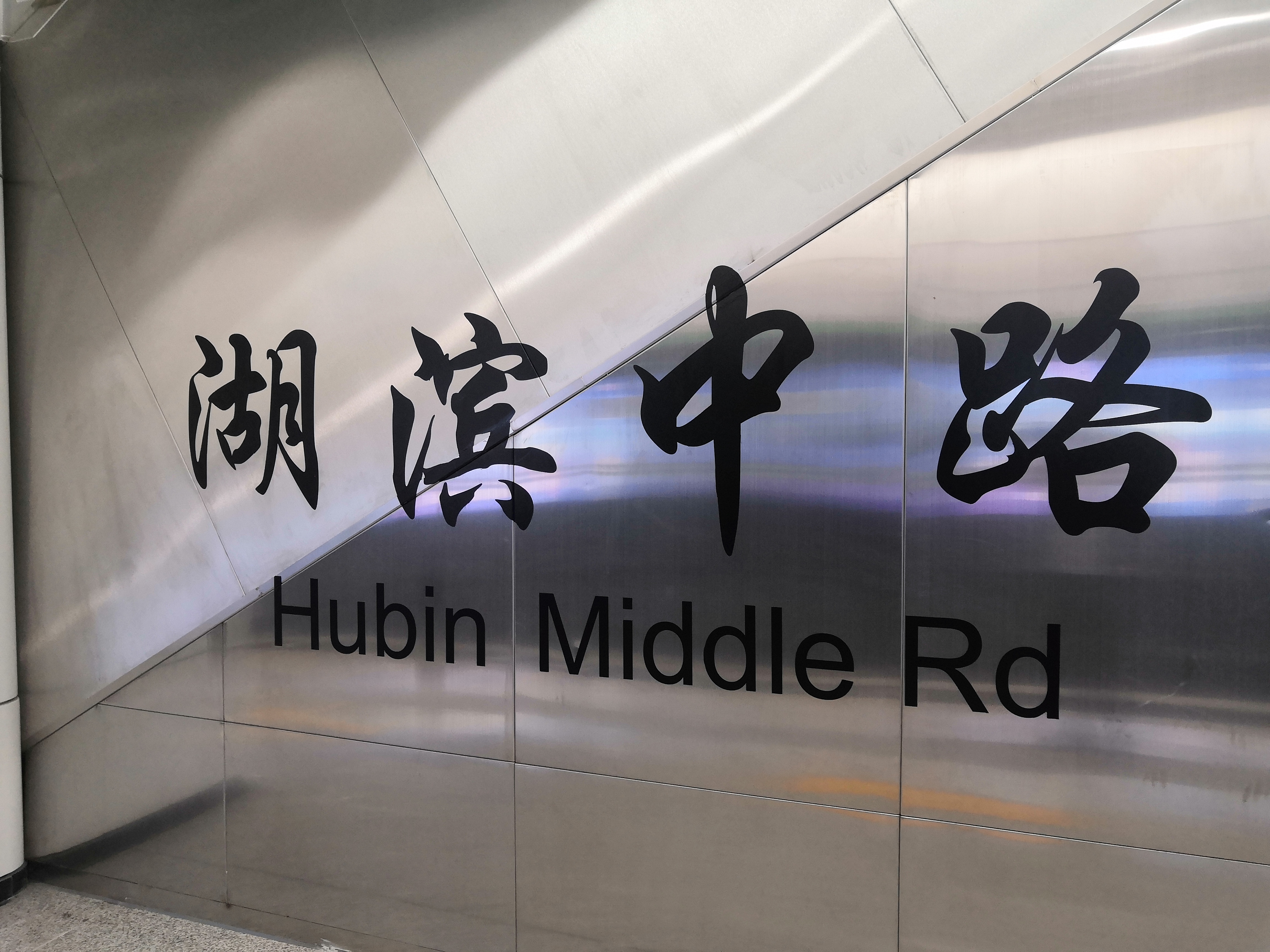 湖滨中路站的标志